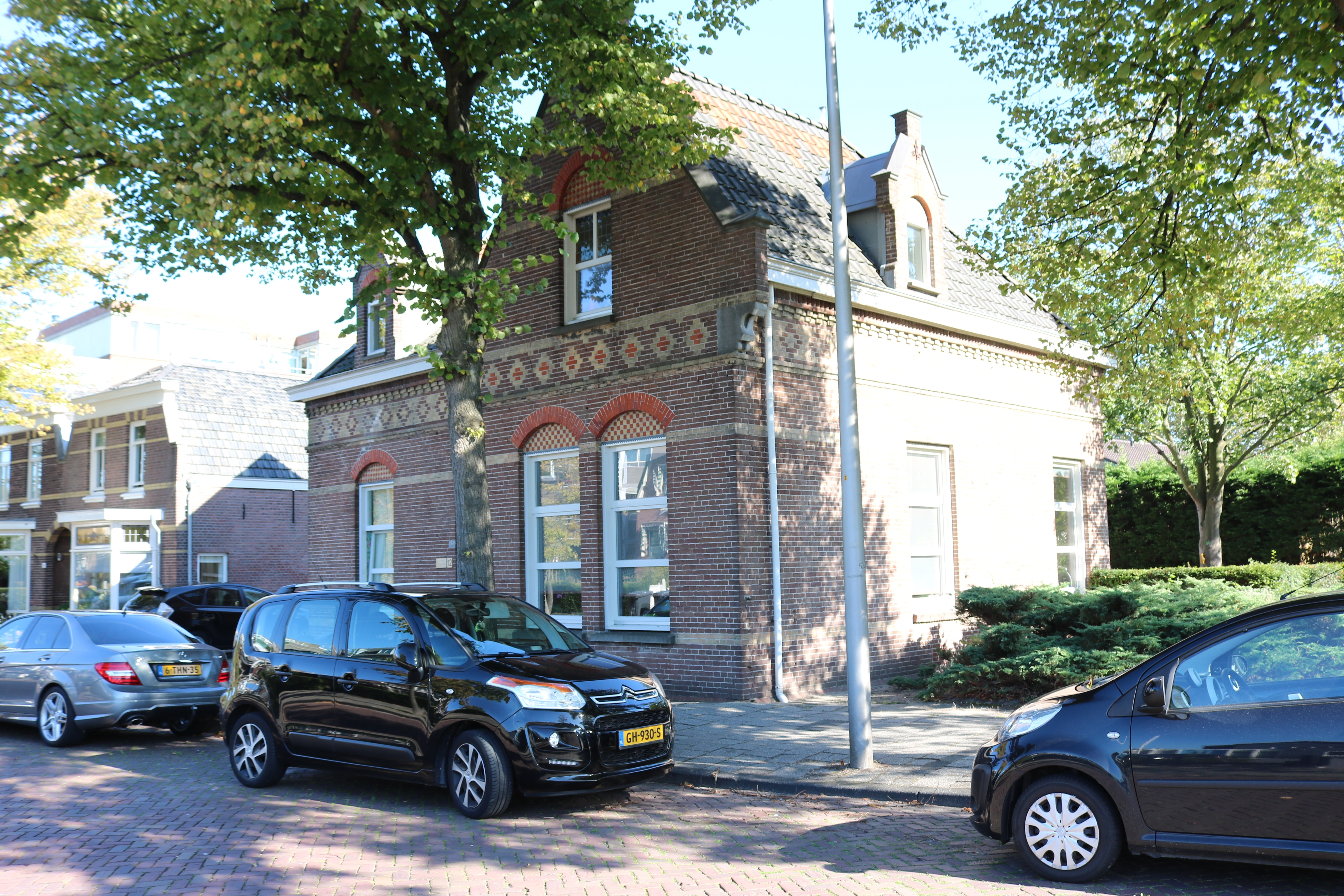 Het eerste tramstation van de WSM uit 1895 aan de Dijkweg 12 in Naaldwijk. Het werd wegens de verlening van de tramlijn vervangen door het station uit 1907. (foto: Daniel van der Ree, 26 september 2018)